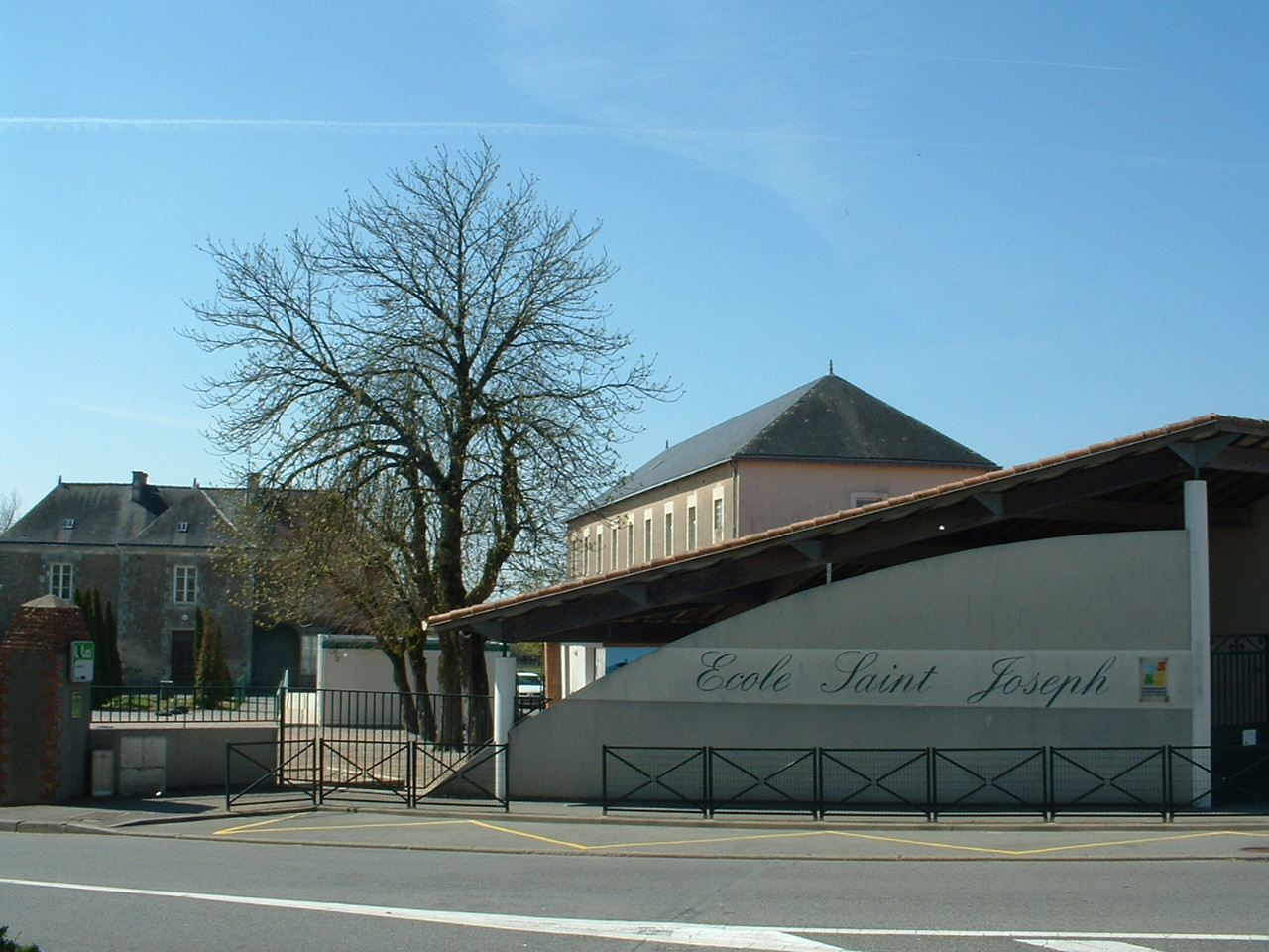 Chauvé (France) - Ecole privée Saint-Joseph